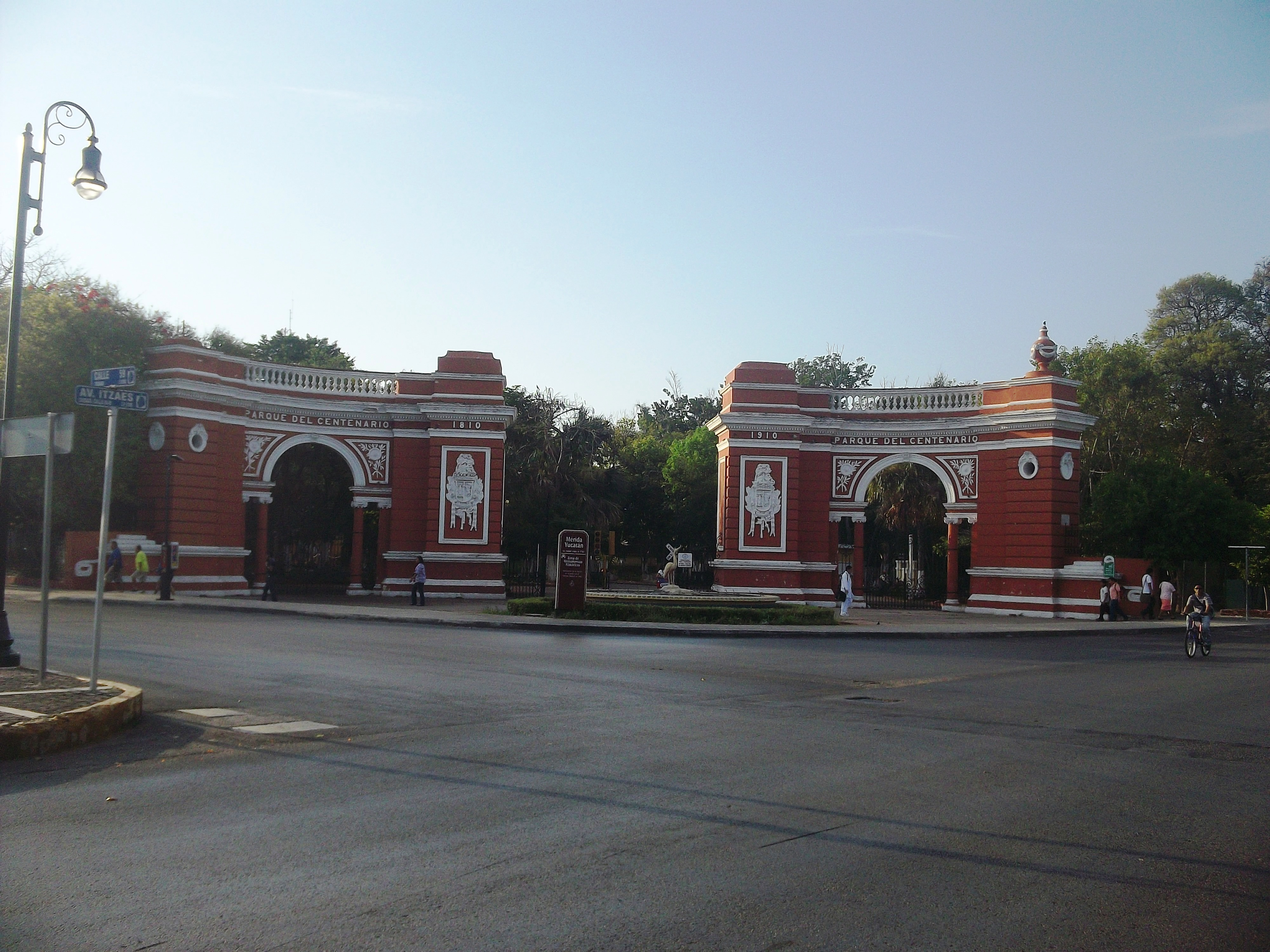 Puerta principal del Parque Zoológico del Centenario en Mérida, Yucatán.